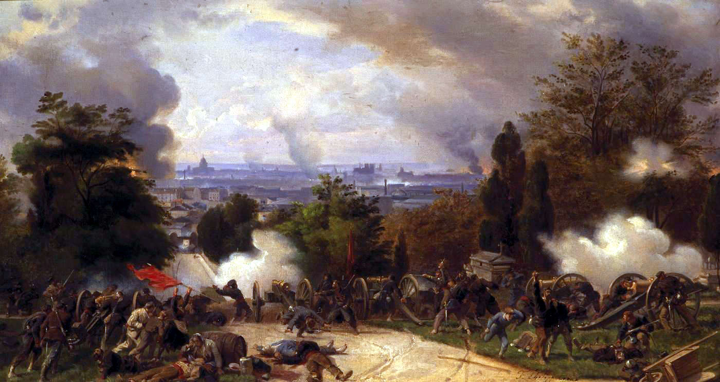 Comune di Parigi. Combattimento nel cimitero Père Lachaise il 27 maggio 1871.